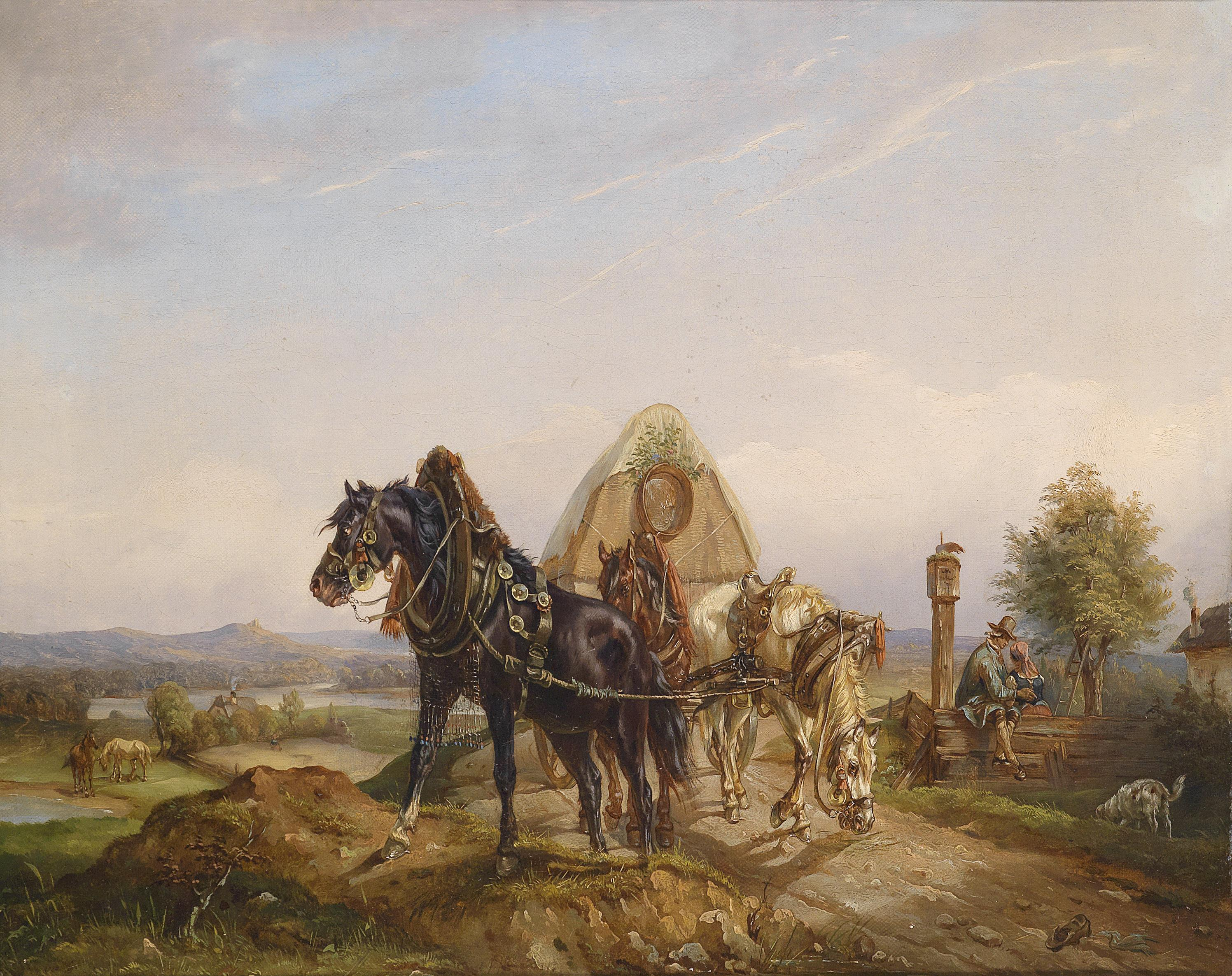 Das Fuhrwerktitle QS:P1476,de:"Das Fuhrwerk" label QS:Lde,"Das Fuhrwerk"